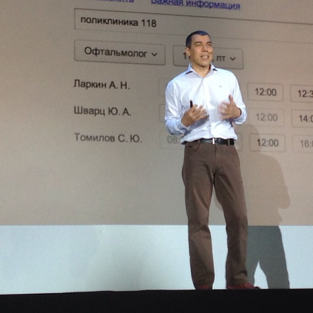 Илья Сегалович презентует новую выдачу Яндекса «Острова»